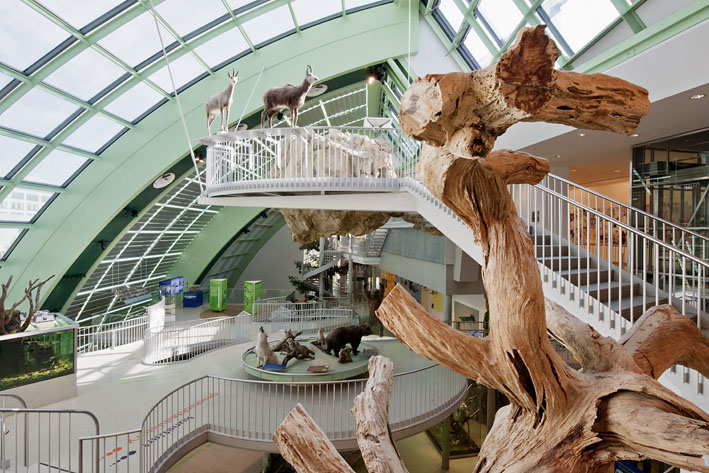 Die Reste der „Breiten Föhre“ im Landesmuseum Niederösterreich, Naturbereich